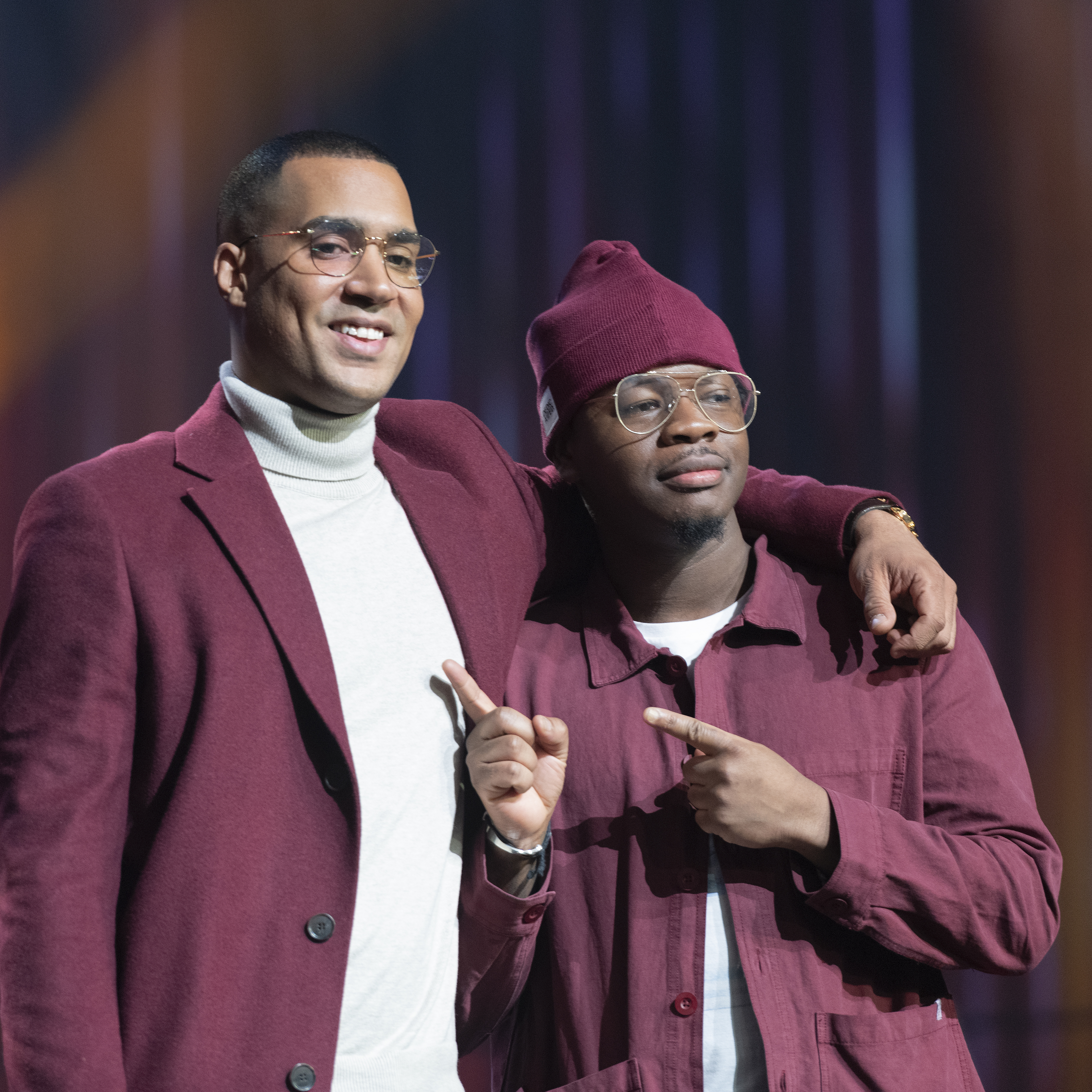 OVÖ Melodifestivalen 2020 Linköping presskonferensen